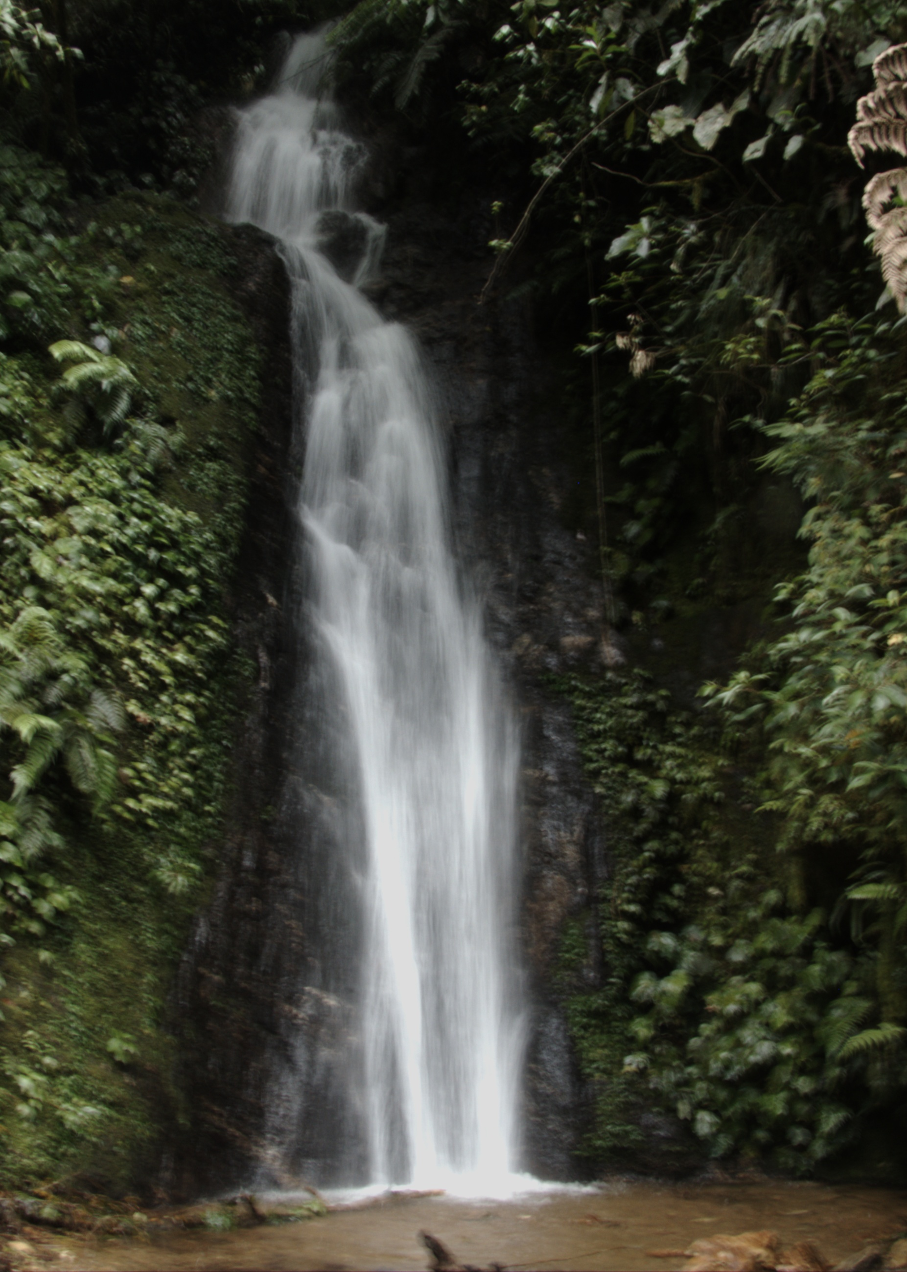 Tanetze de Zaragoza, Julio 2008